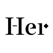 Logo officiel du Groupe Her